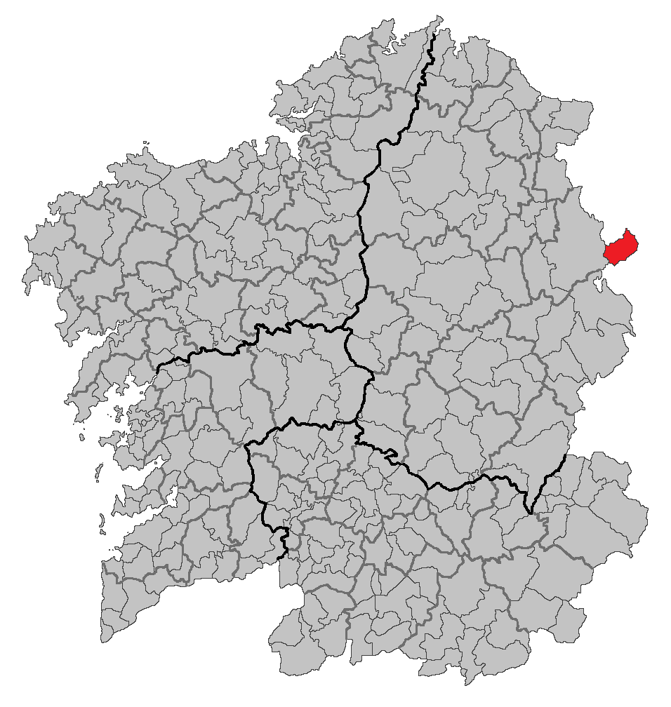 Mapa coa localización do concello de Negueira de Muñiz.